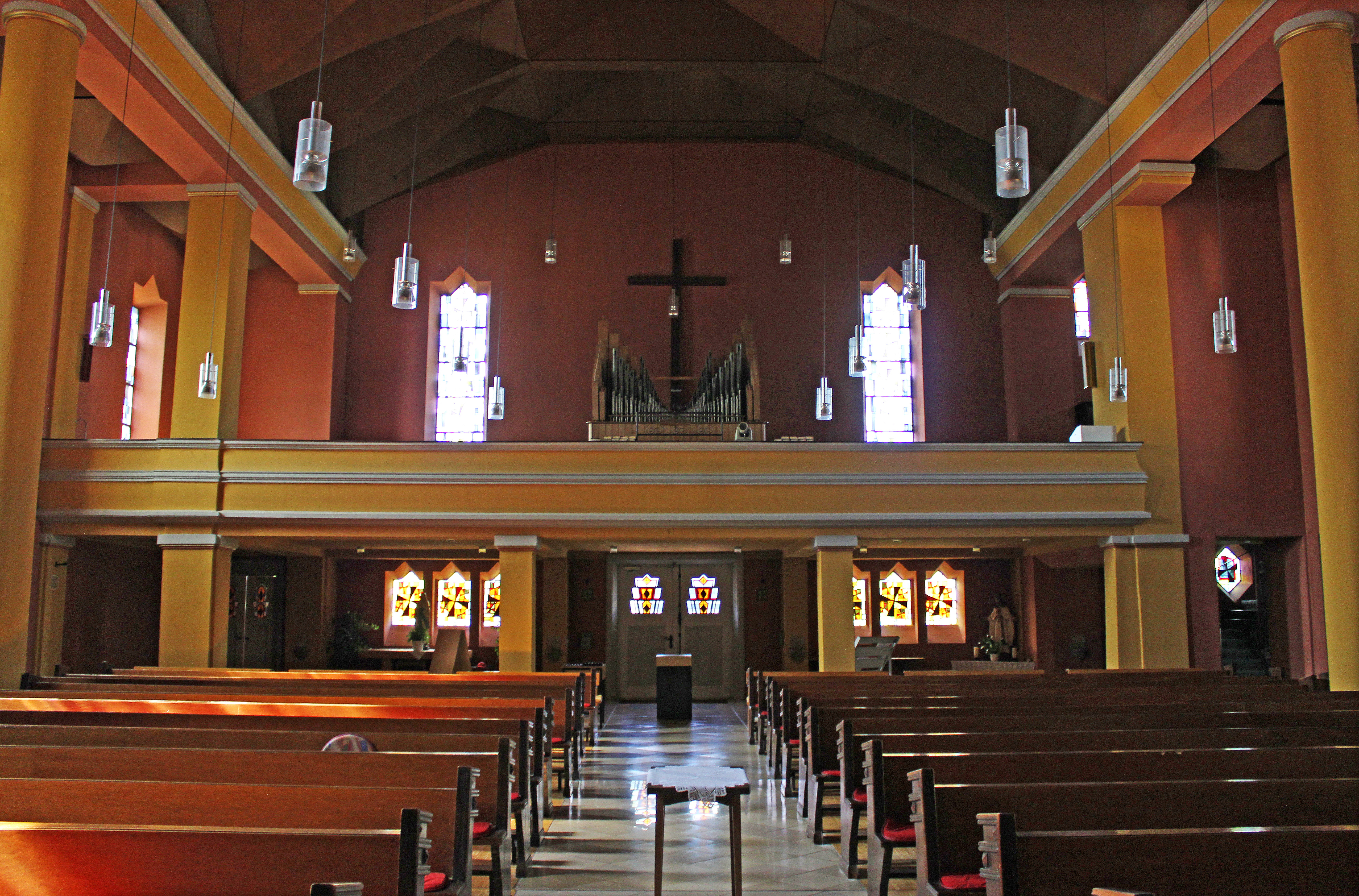 Blick ins Innere der katholischen Pfarrkirche St. Elisabeth in Altenkessel-Rockershausen, einem Stadtteil der saarländischen Landeshauptstadt Saarbrücken